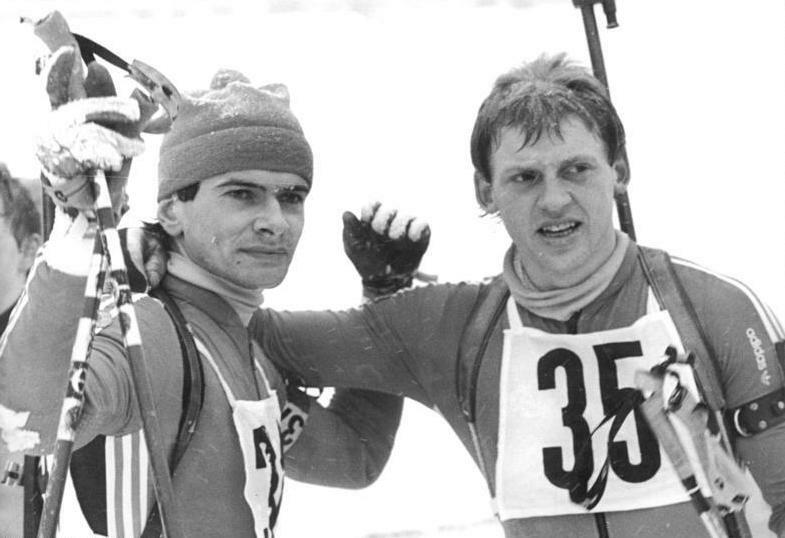 Matthias Jacob, Holger Wick ADN-ZB Schaar 31.1.84 Bez. Suhl: 27. DDR-Meisterschaften im Biathlon in Oberhof- Matthias Jacob (links) und Holger Wick (rechts- beide ASK Vorwärts Oberhof) erkämpften sich gemeinsam den Titel über 20km. In 1:04:22 h bei zwei bzw. drei Strafminuten erreichten sie im "toten Rennen" das Ziel. Ein Ergebnis, das in dieser Sportart Seltenheitswert hat.